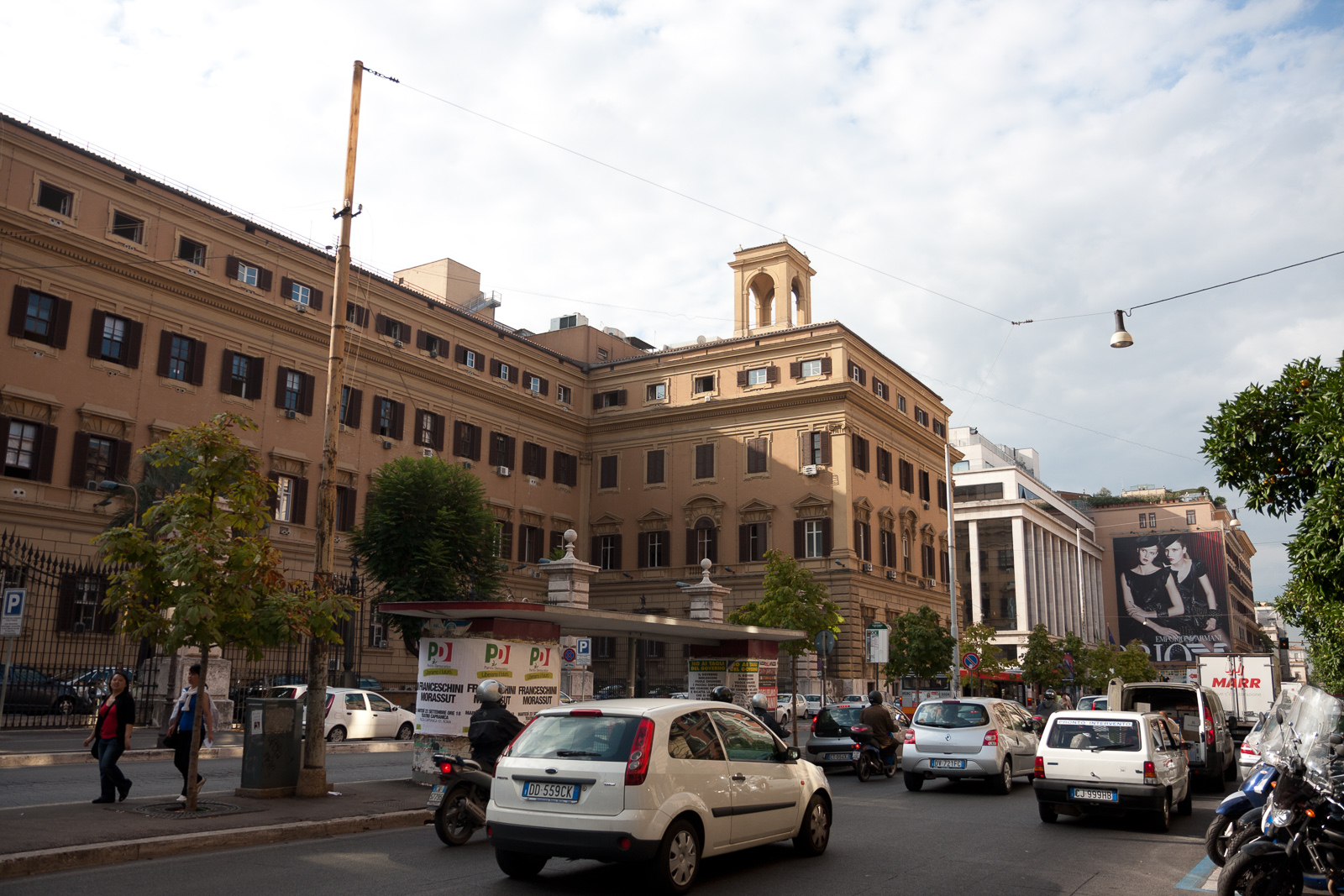 Ministero dell' Economia e delle Finanze